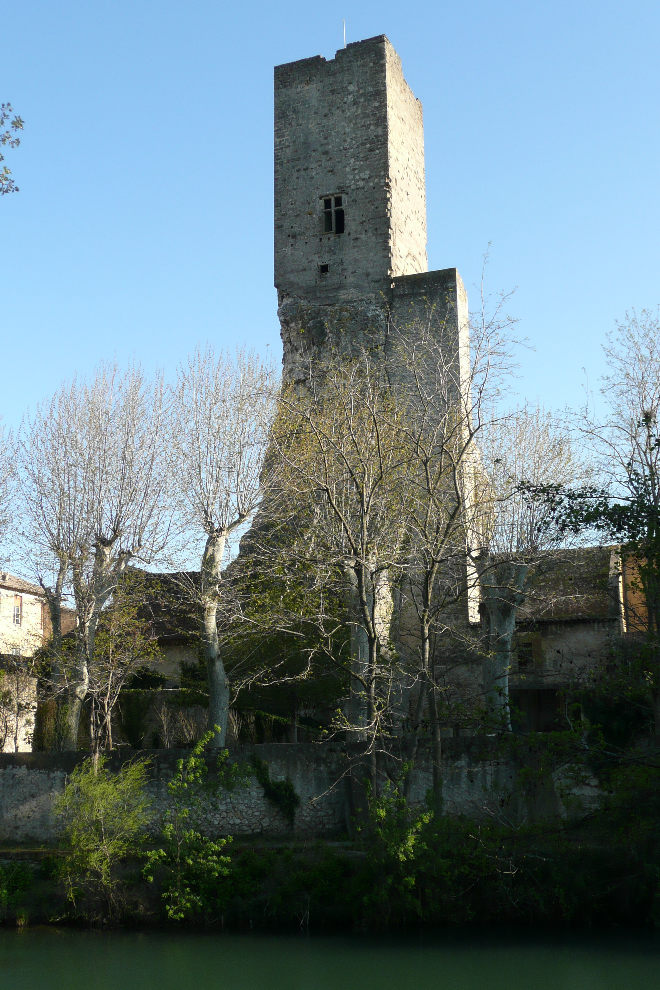 Détail sur la tour à Roquemaure